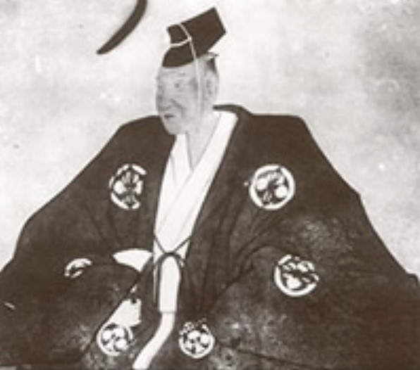 本多利長の肖像。